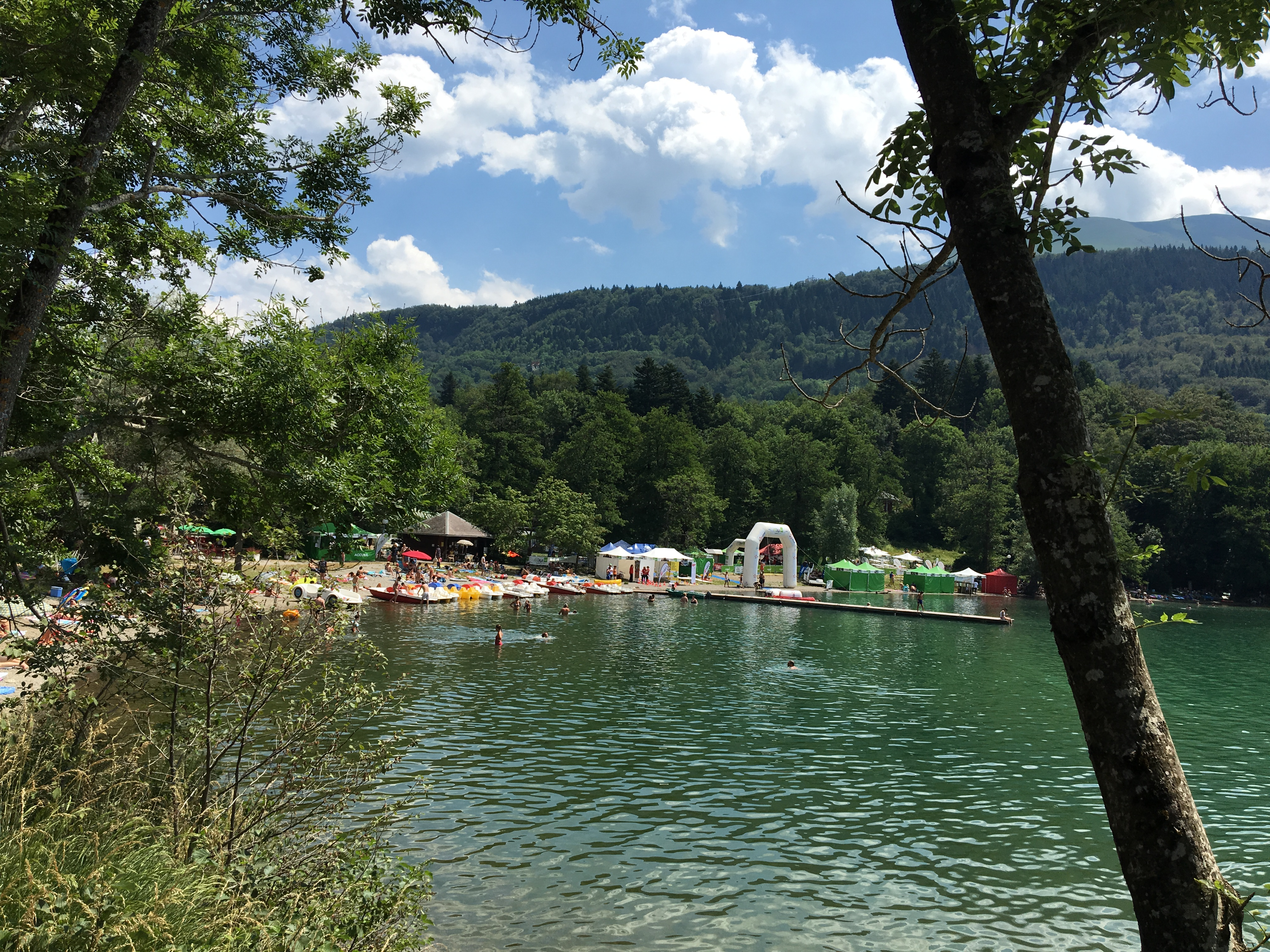 Aire de Départ et d'Arrivée du Triathlon sur la plage du Lac de Laffrey